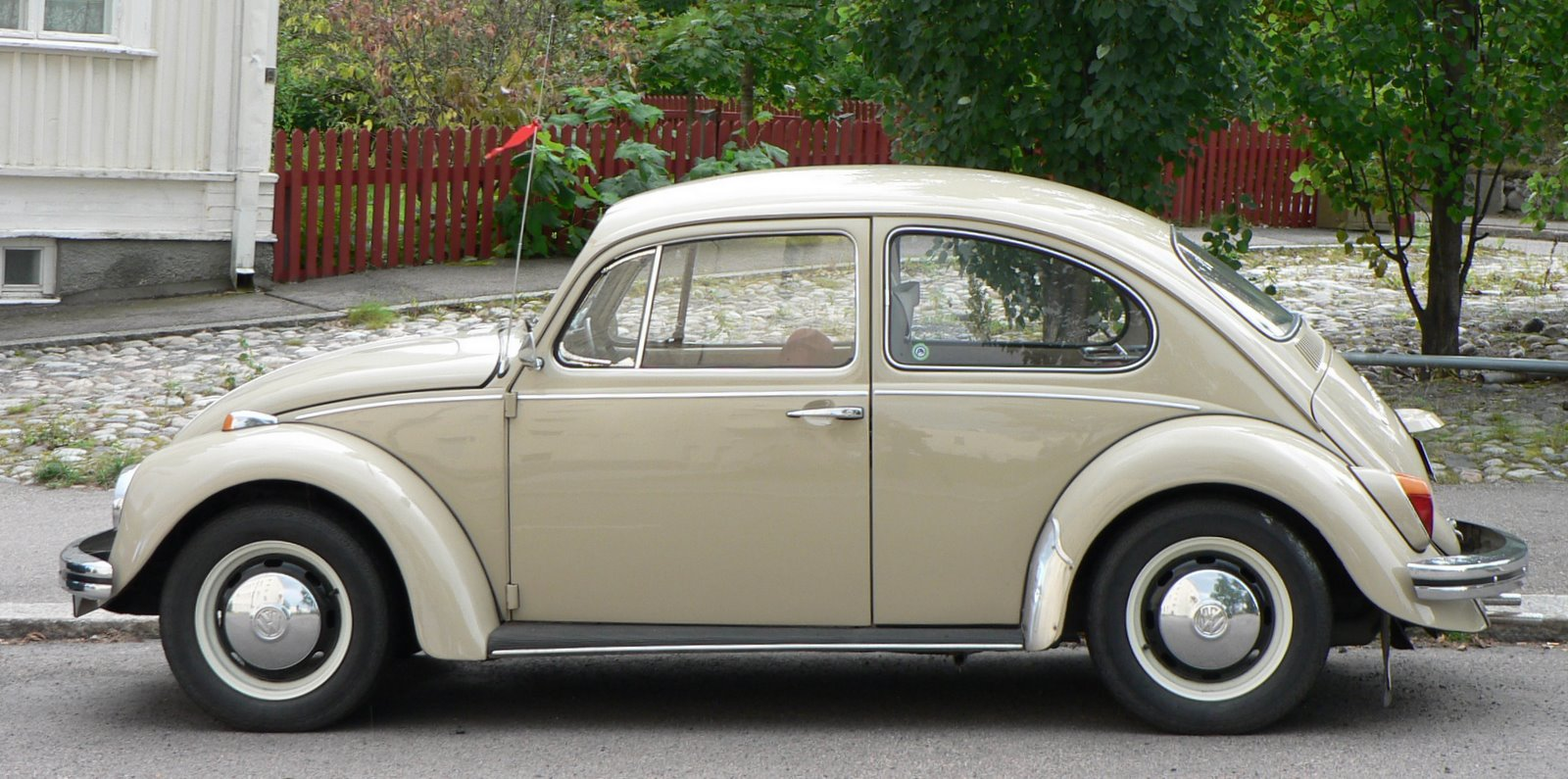 VW 1300